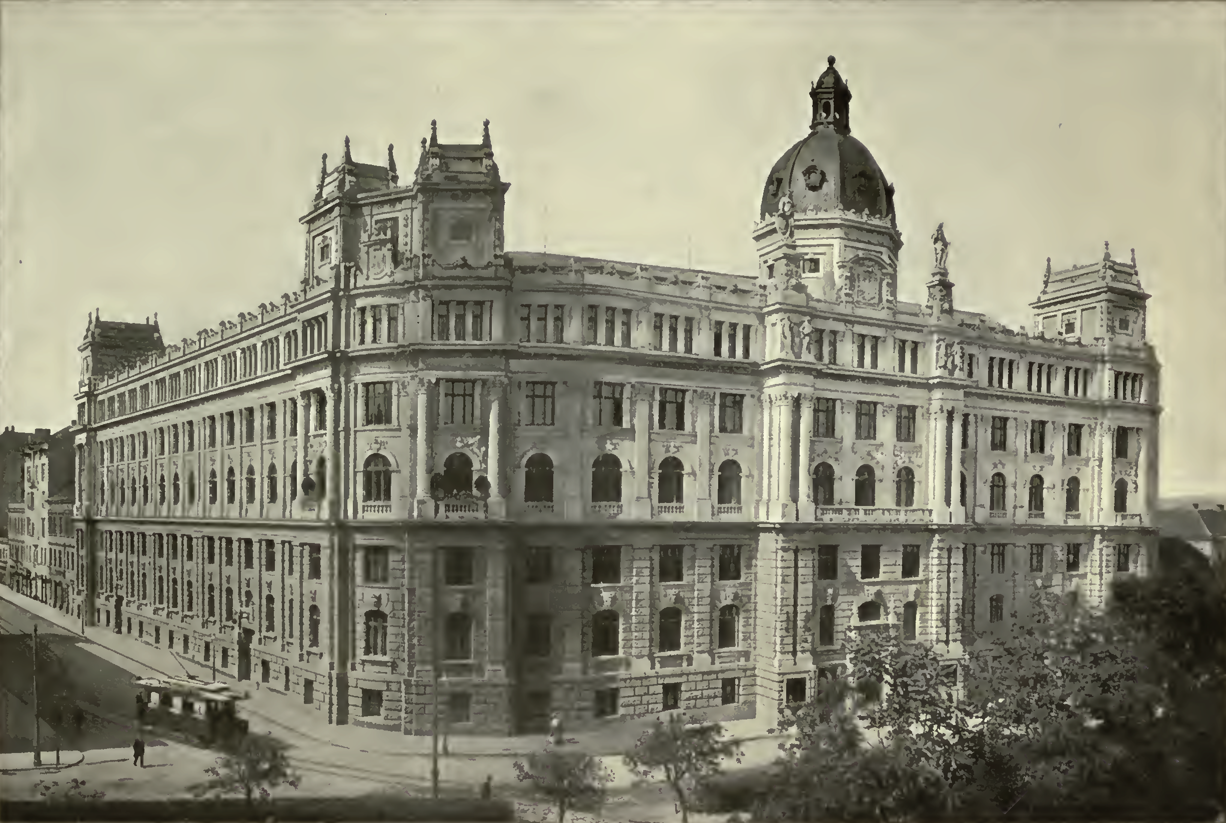 Historická budova Moravského zemského archivu na dnešním Žerotínově náměstí; snímek z roku 1908